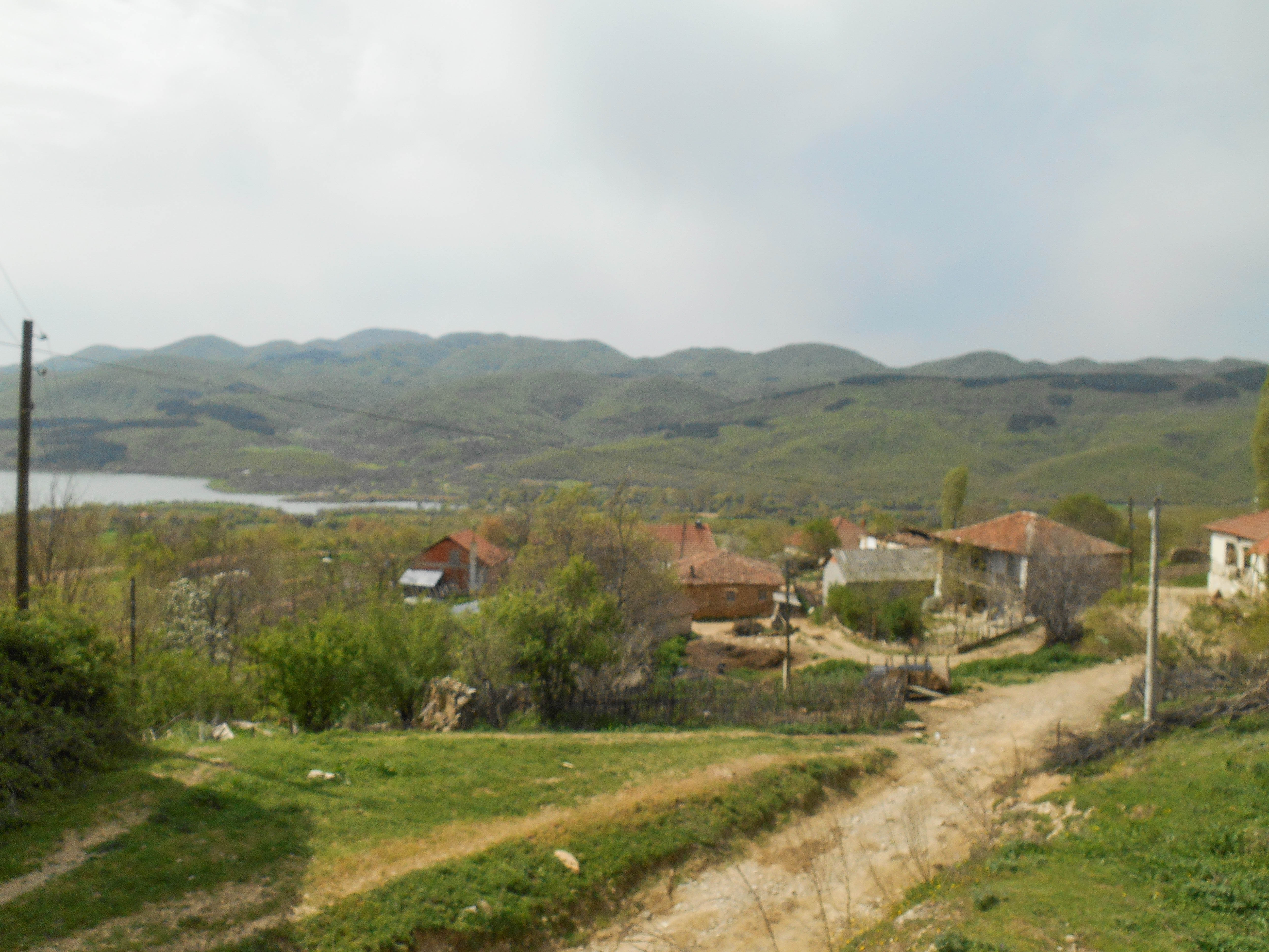 Белотино, Општина Струмица